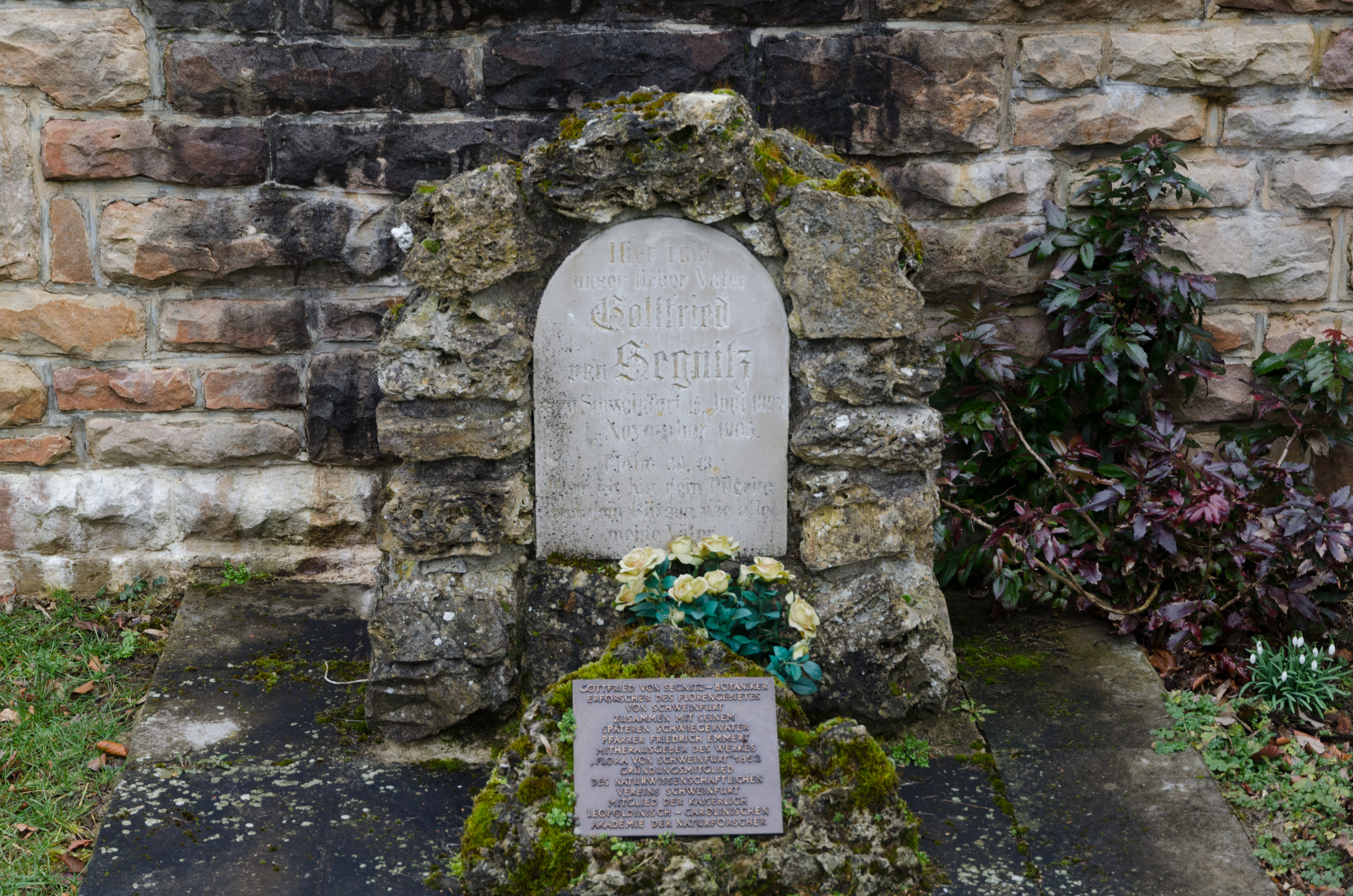 Hendungen, Rappershausen, Segnitz Grabmal